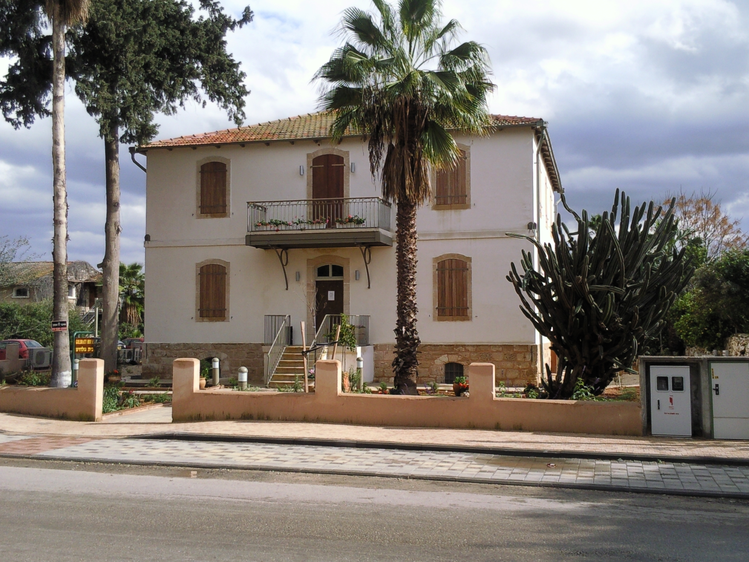 בית טמפלרי במושב בני עטרות